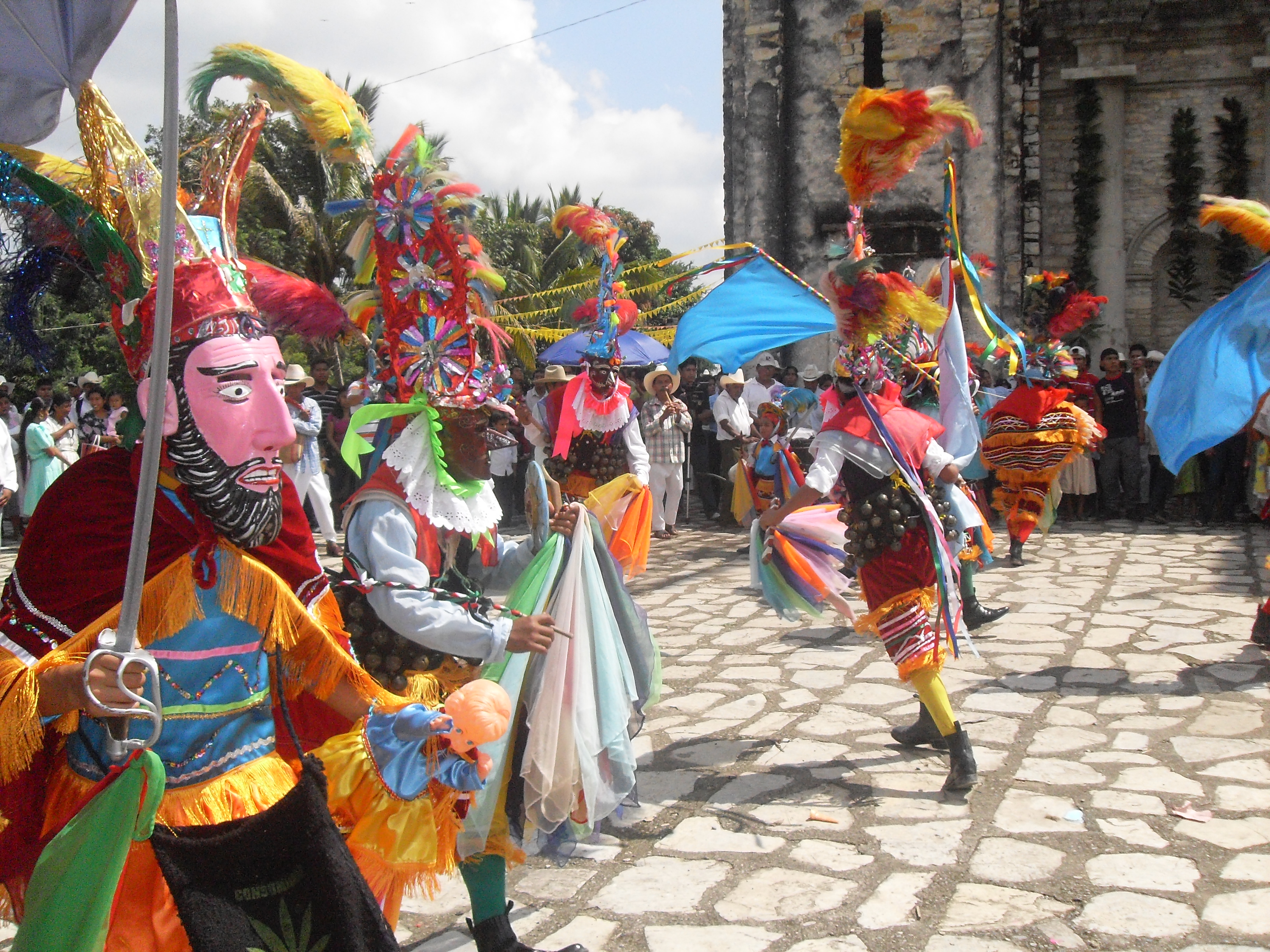 Danzantes en Frente a la Parroquia de San Miguel Arcangel